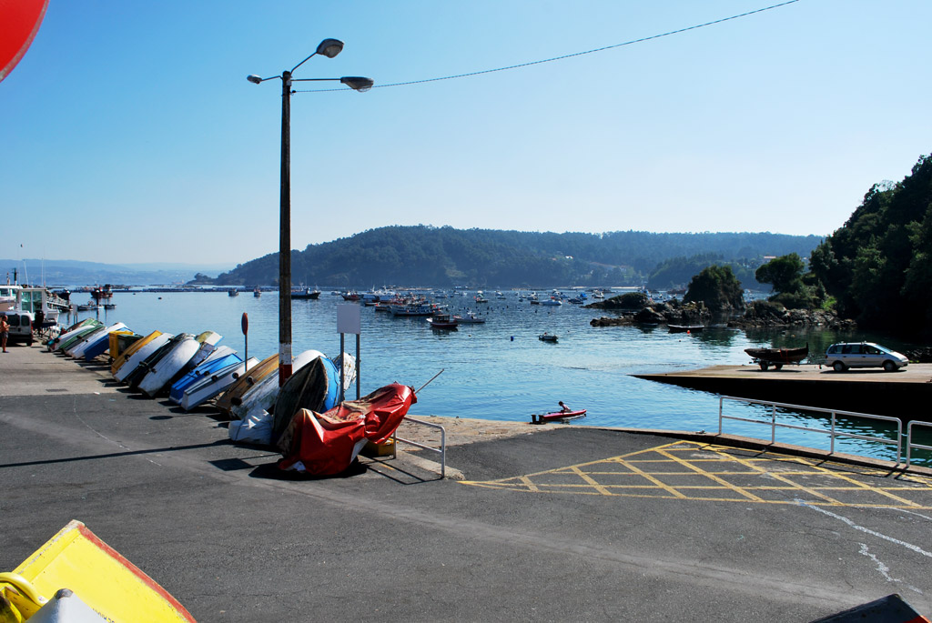 Imaxe do Porto de Lorbé.